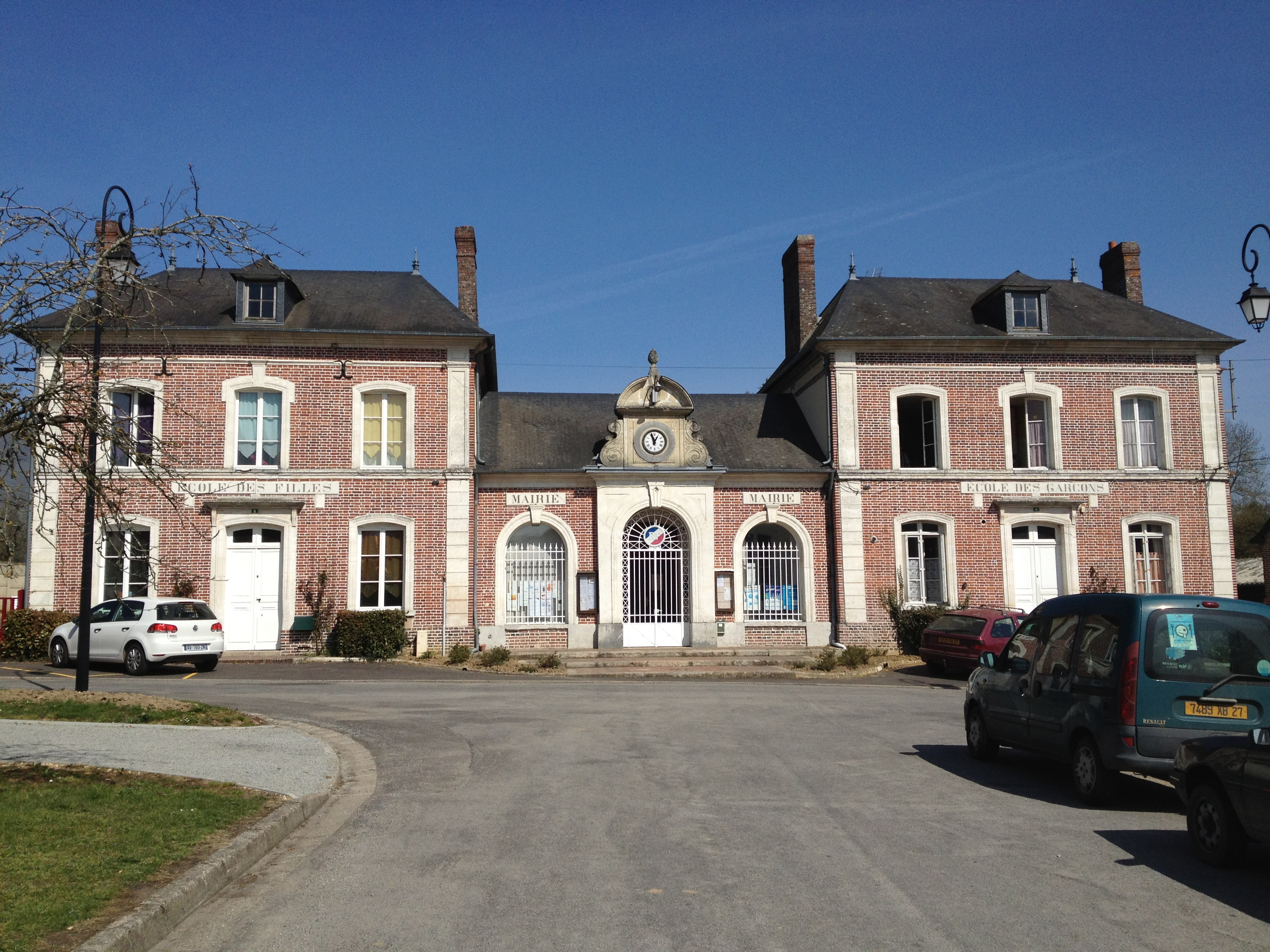 Mairie de Fontaine-la-Soret.